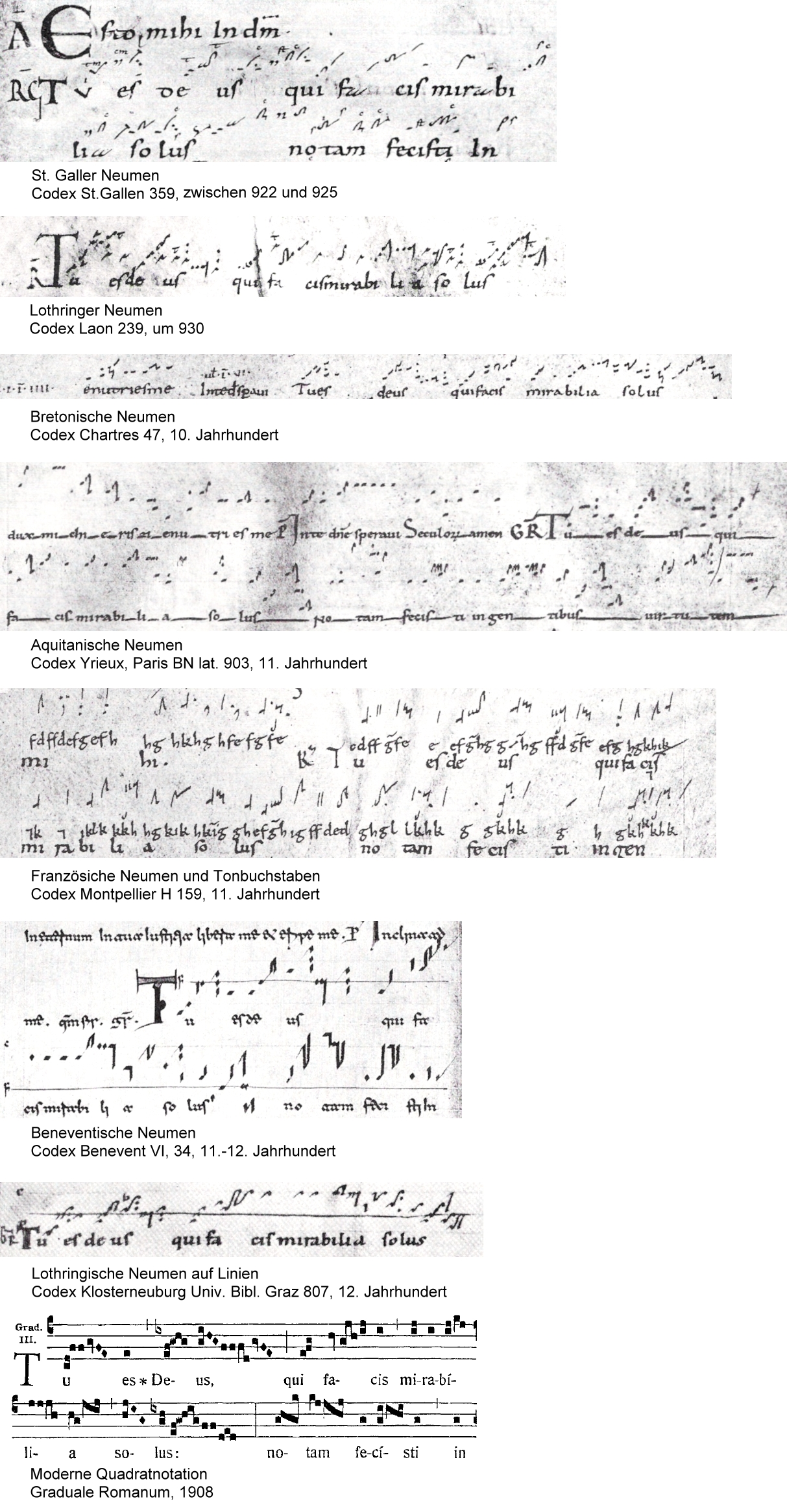 Synopse von Notationen des Graduales "Tu es Deus". Alle verwendeten Vorlagen sind gemeinfrei.